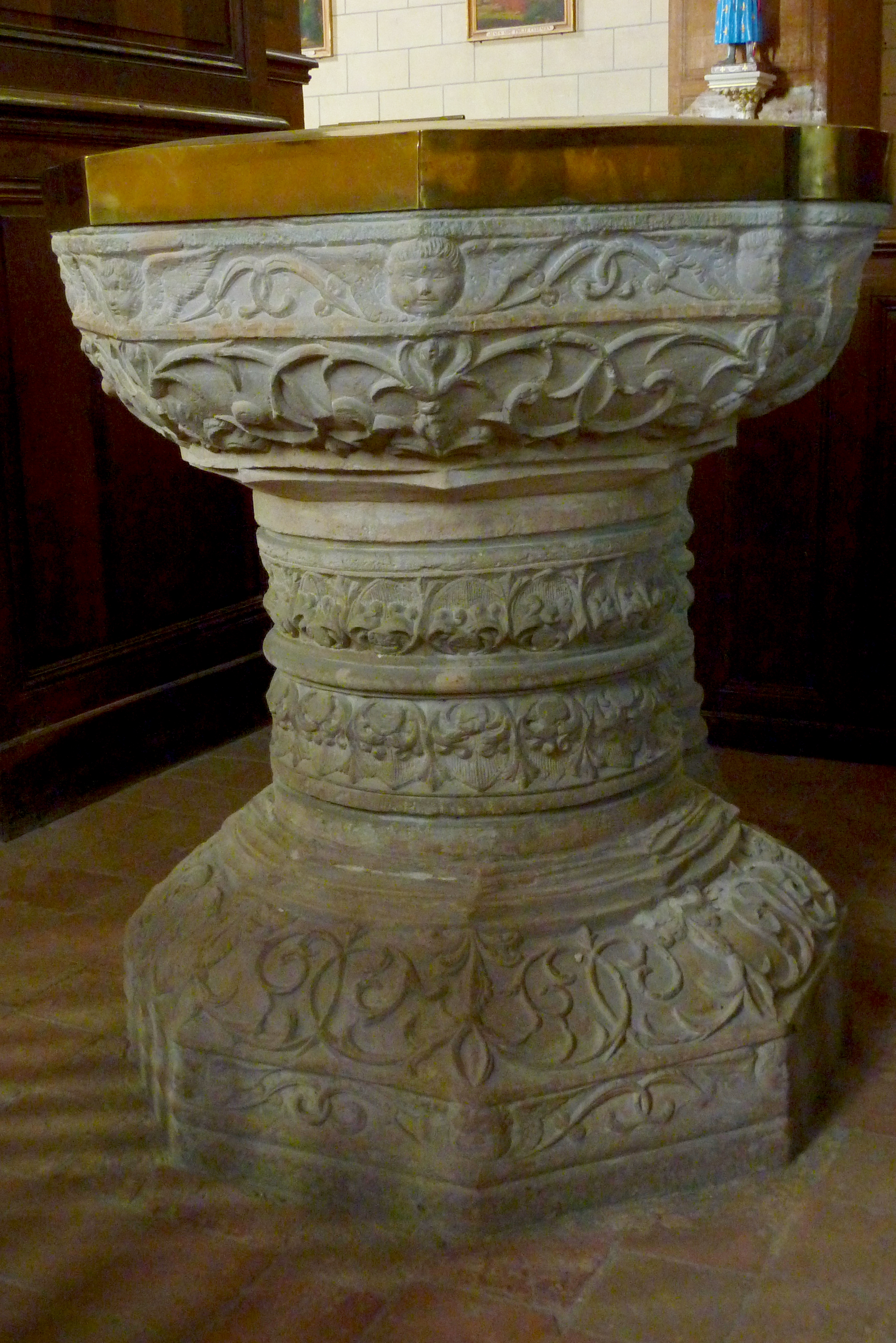 Taufstein in der Kirche Saint-Pierre-Saint-Paul in Jouy-sur-Morin im Département Seine-et-Marne (Île-de-France), von 1527 (siehe Le Patrimoine des Communes de la Seine-et-Marne. Flohic Editions, Bd. 1, Paris 2001, S. 516, ISBN 2-84234-100-7)